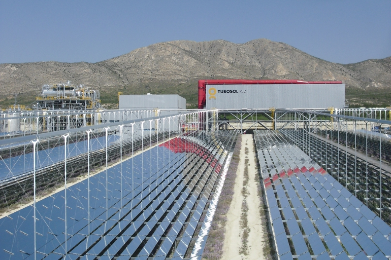 CSP Fresnel Power Station Puerto Errade 2